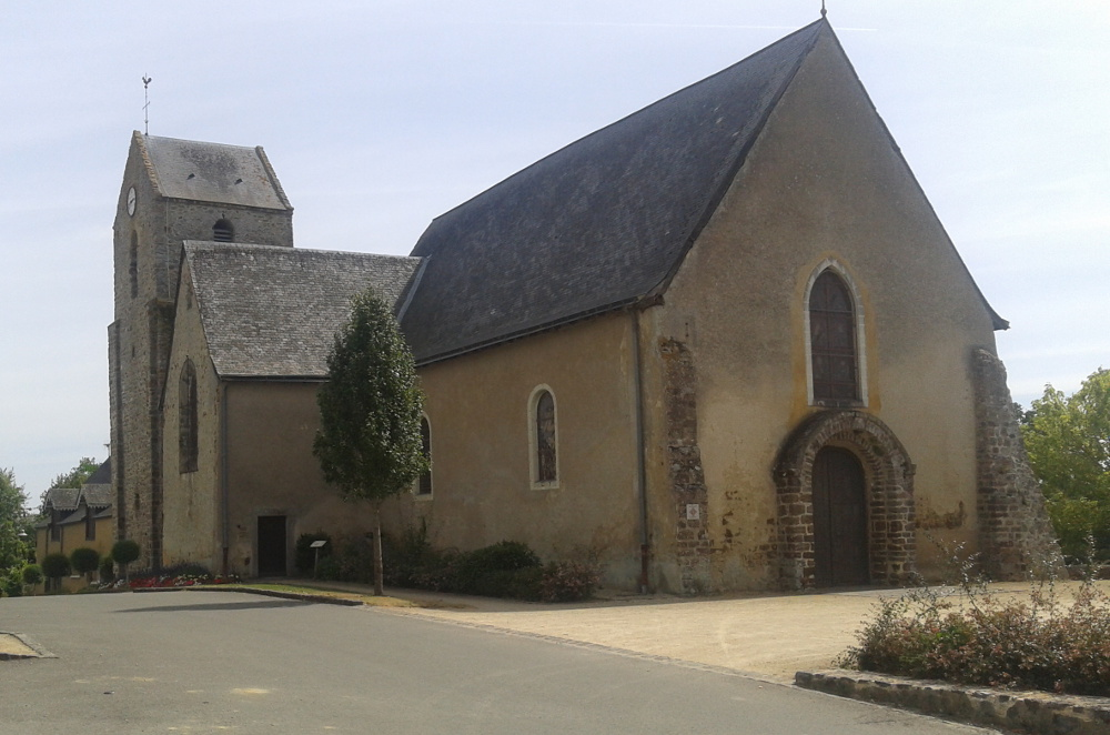 Église Saint-Denis de Saint-Denis-du-Maine .